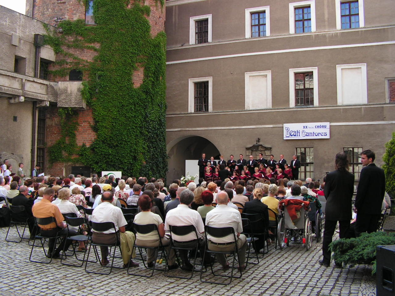 Dziedziniec Zamku Książąt Głogowskich - koncert chórów